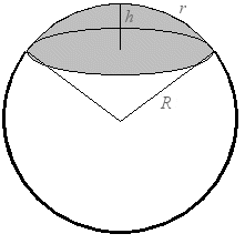 Calotte sphérique